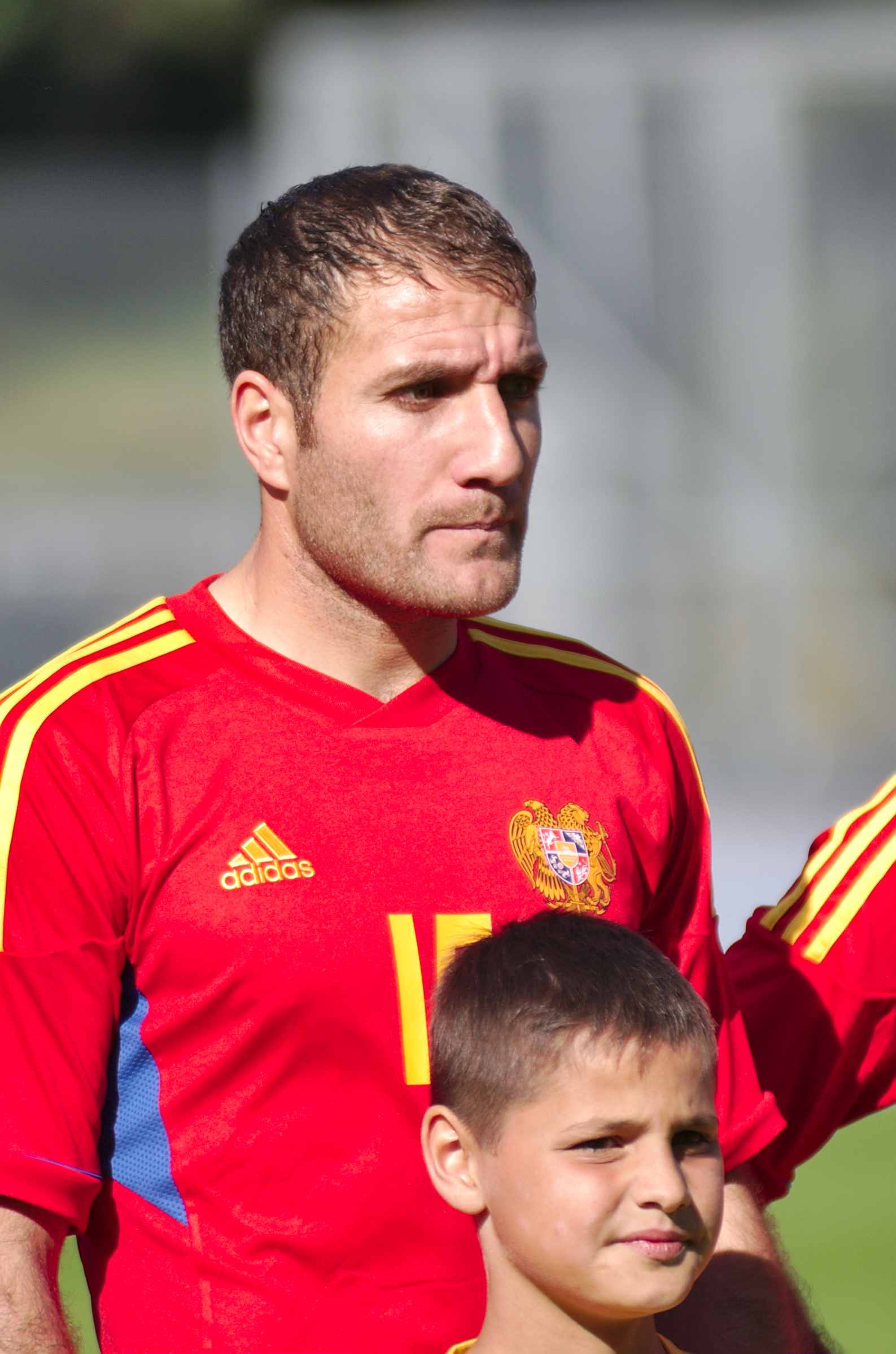 Algérie - Arménie - 20140531 - Hrayr Mkoyan